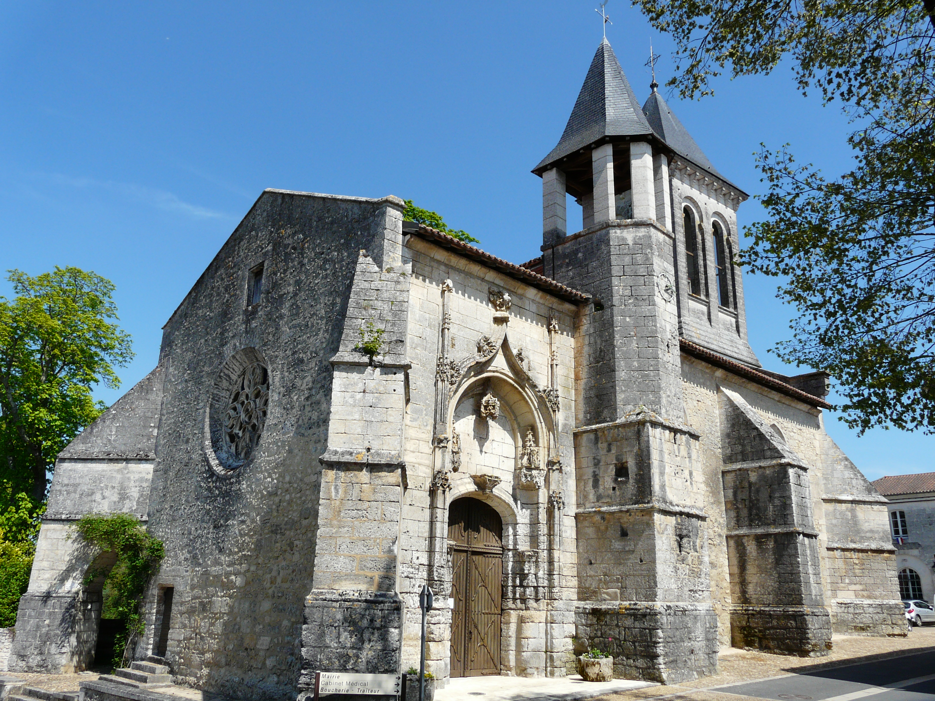 L'église Saint-Christophe, Champagnac-de-Belair, Dordogne, France Object location45° 23′ 37″ N, 0° 41′ 55″ E